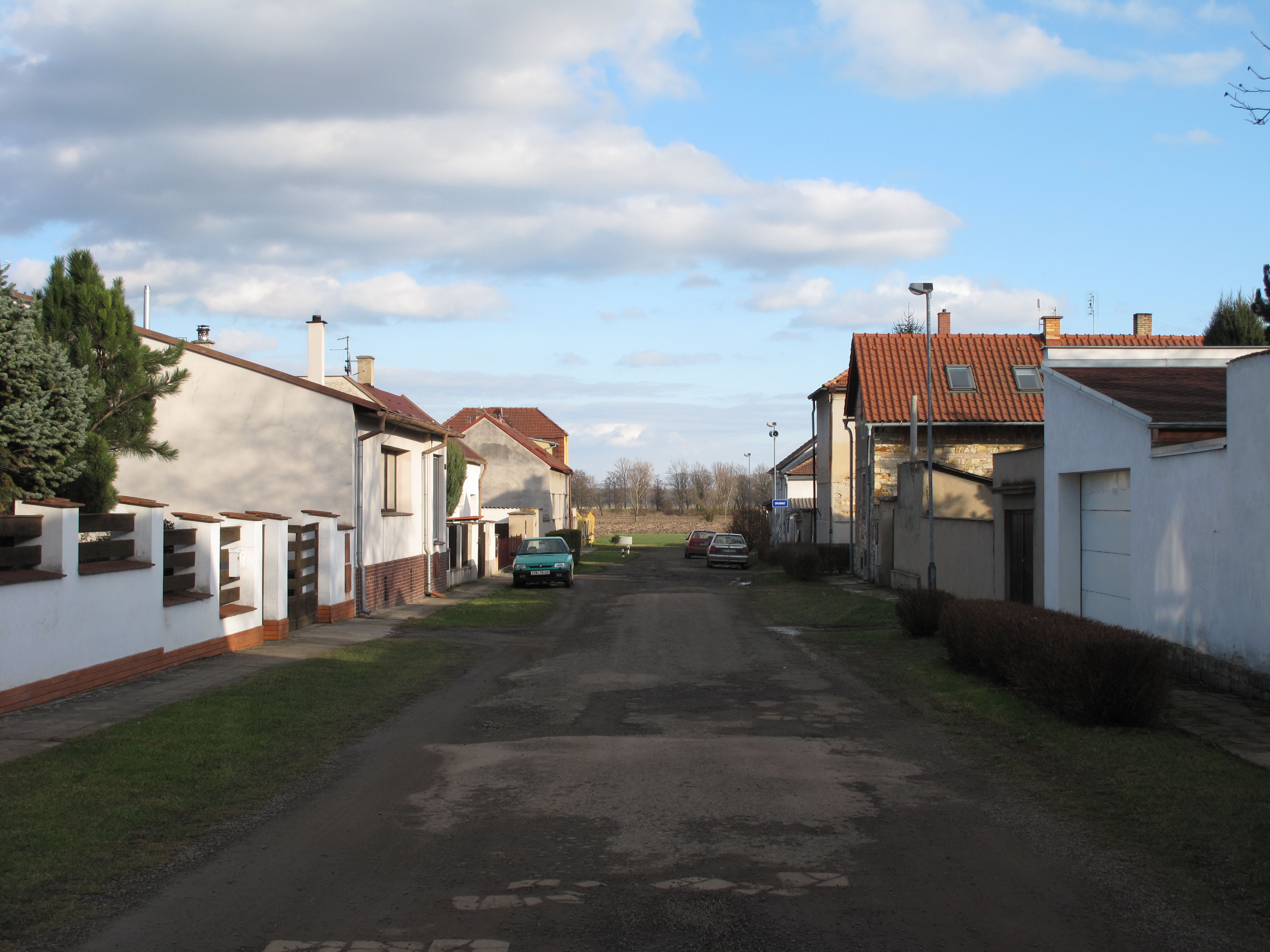 Ulice v Poplzích. Okres Litoměřice, Česká republika.